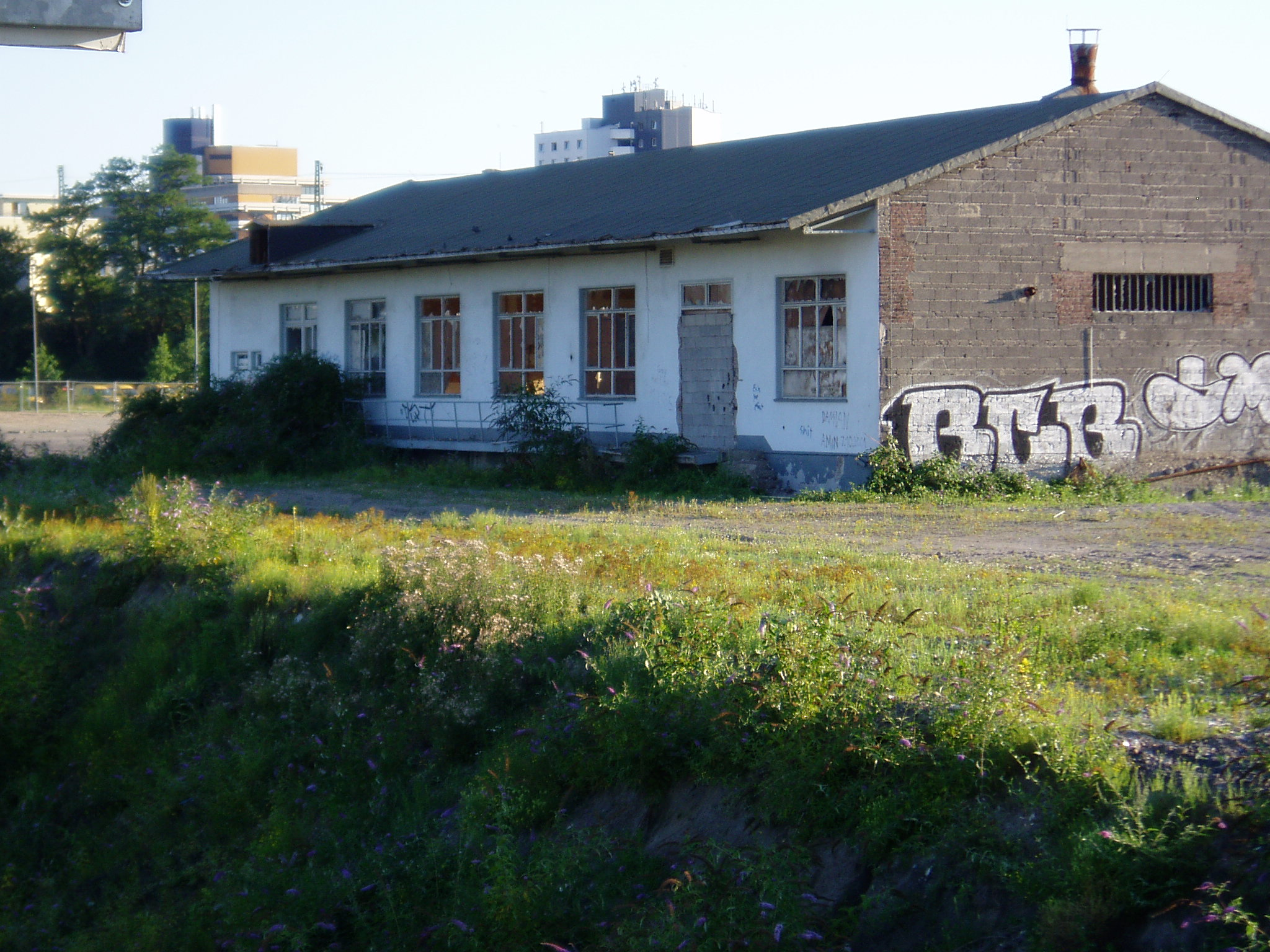 Köln-Kalk - Ruine des letzten Gebäudes der Chemischen Fabrik Kalk (Salpeterlager), inzwischen auch abgerissen.